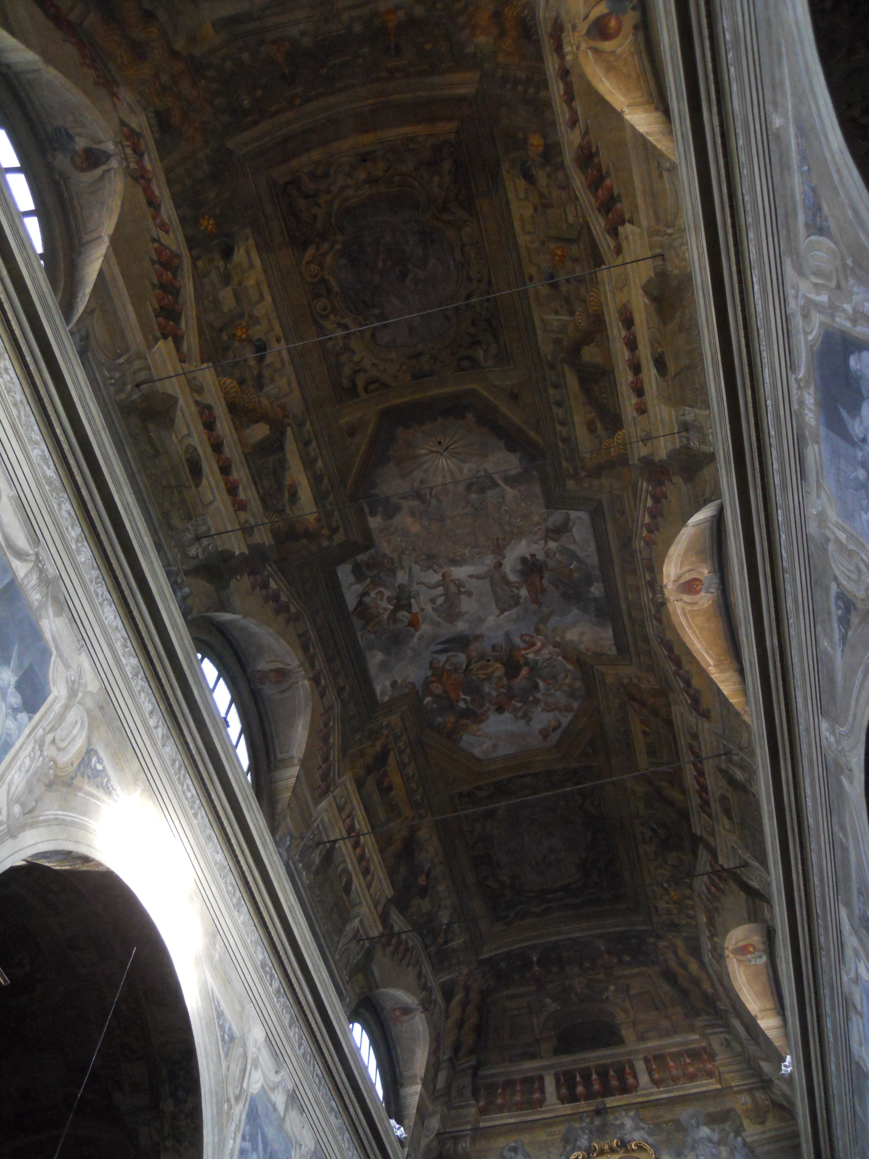 San Faustino maggiore (Brescia) (affresco navata)